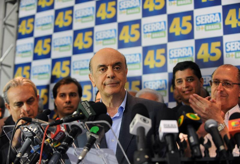 José Serra faz pronunciamento como candidato derrotado à Presidência da República.